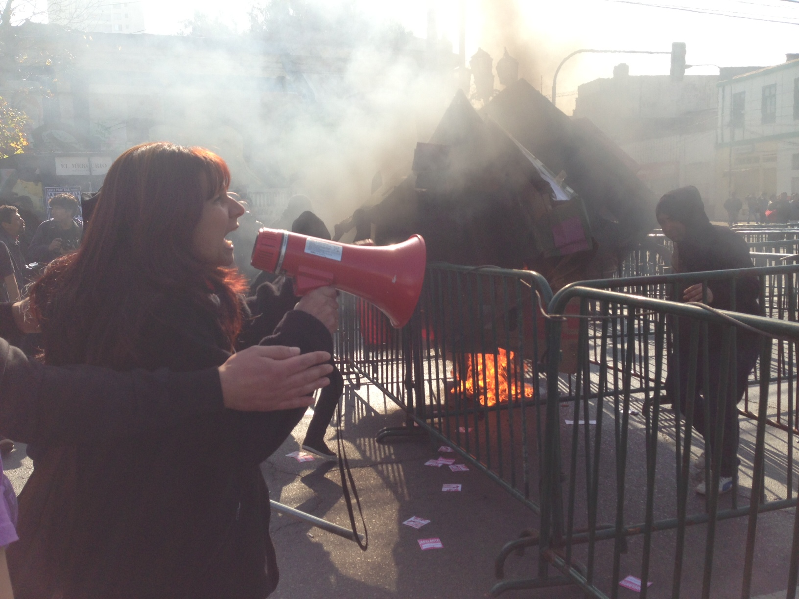 Roxana Miranda el 21 de mayo de 2013, Valparaíso